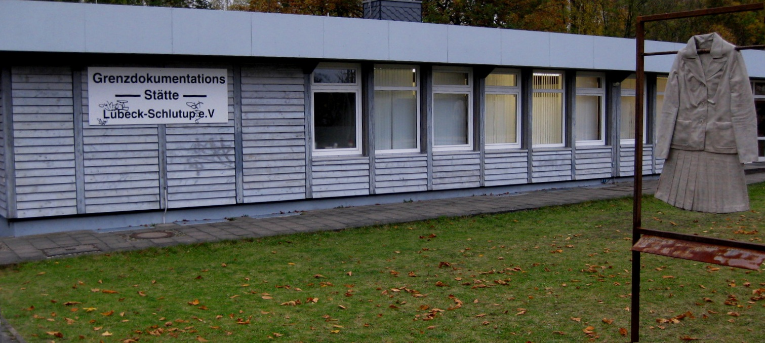 Grenzdokumentationsstätte Lübeck-Schlutup